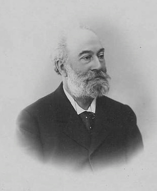 David Raynal (1840-1903), ministre